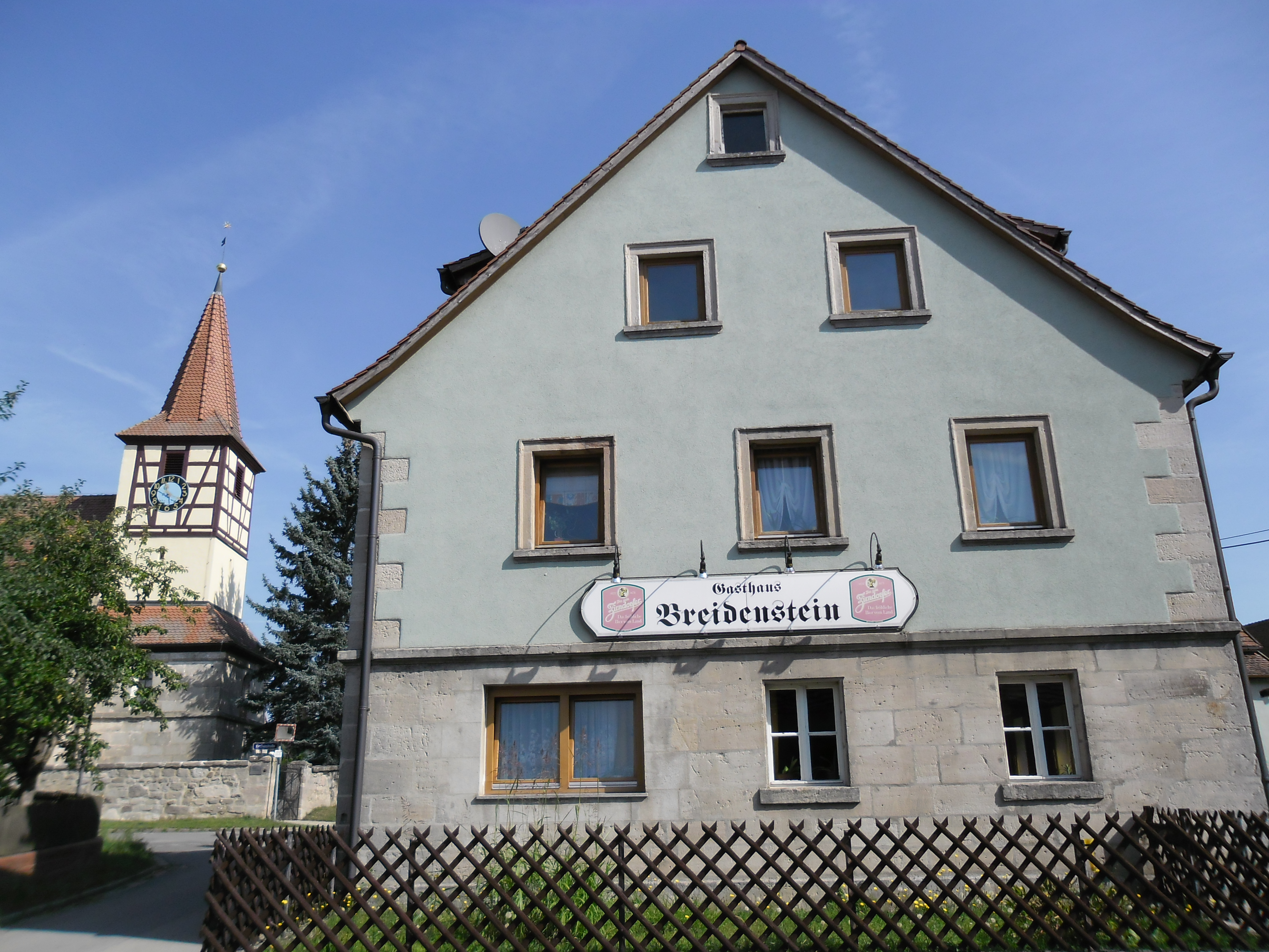 Die evangelische Filialkirche St. Bartholomäus stammt aus dem 15. Jahrhundert, auf einem Sandsteinbau thront ein Fachwerkchortürmchen.